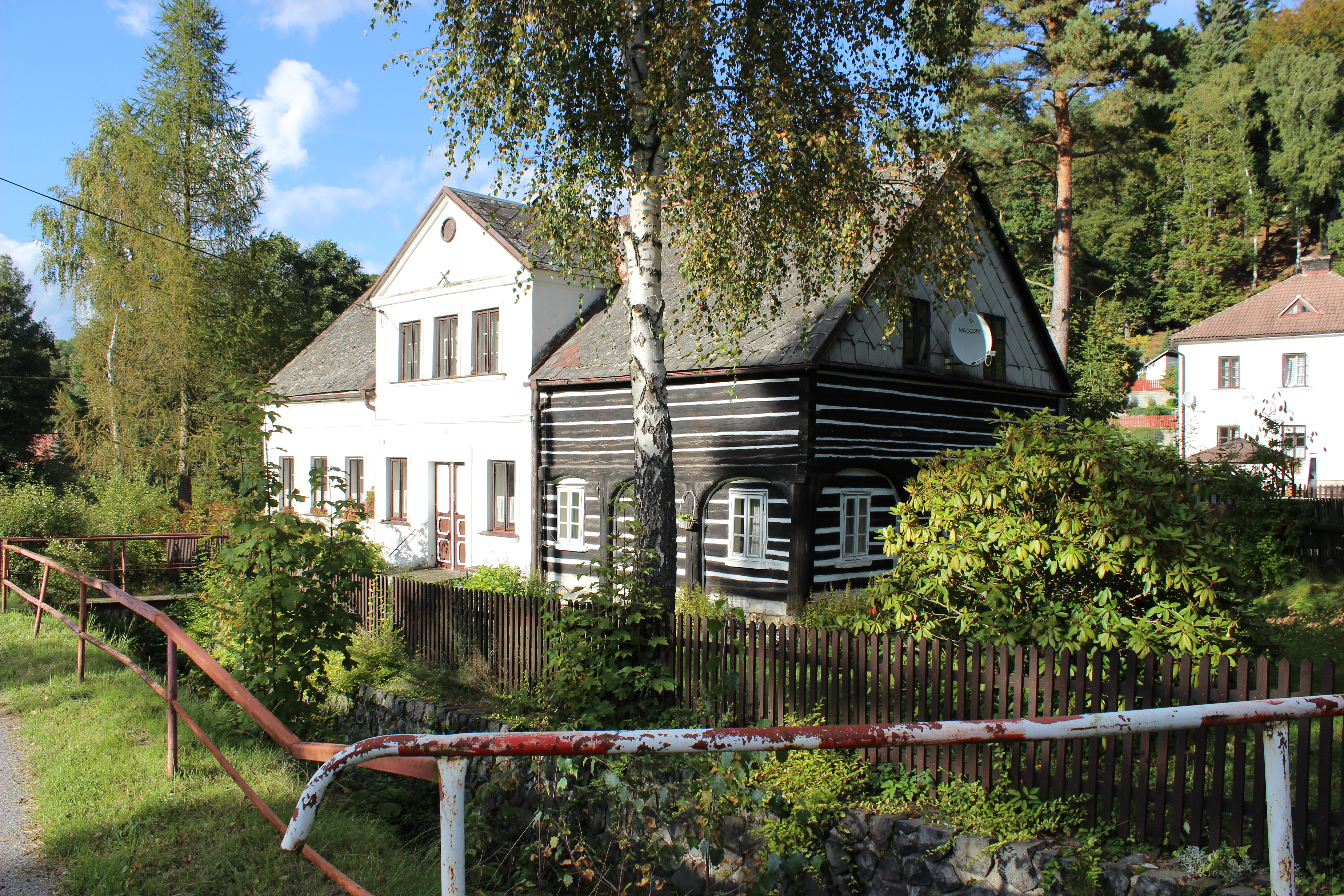 Dům evidenční číslo 66 v Horním Prysku.